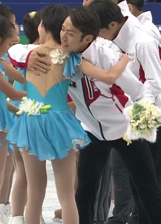 2013年全日本選手権においてフラワーガールの少女にハグをする高橋